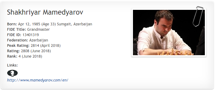 Shahriyar Mammadyarov